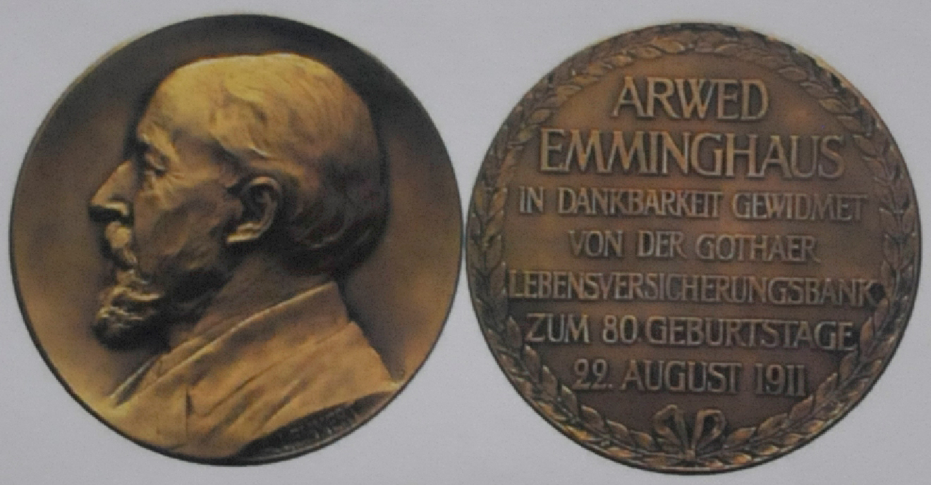 Medaille von Adolf Lehnert zum 80. Geburtstag von Arwed Emminghaus